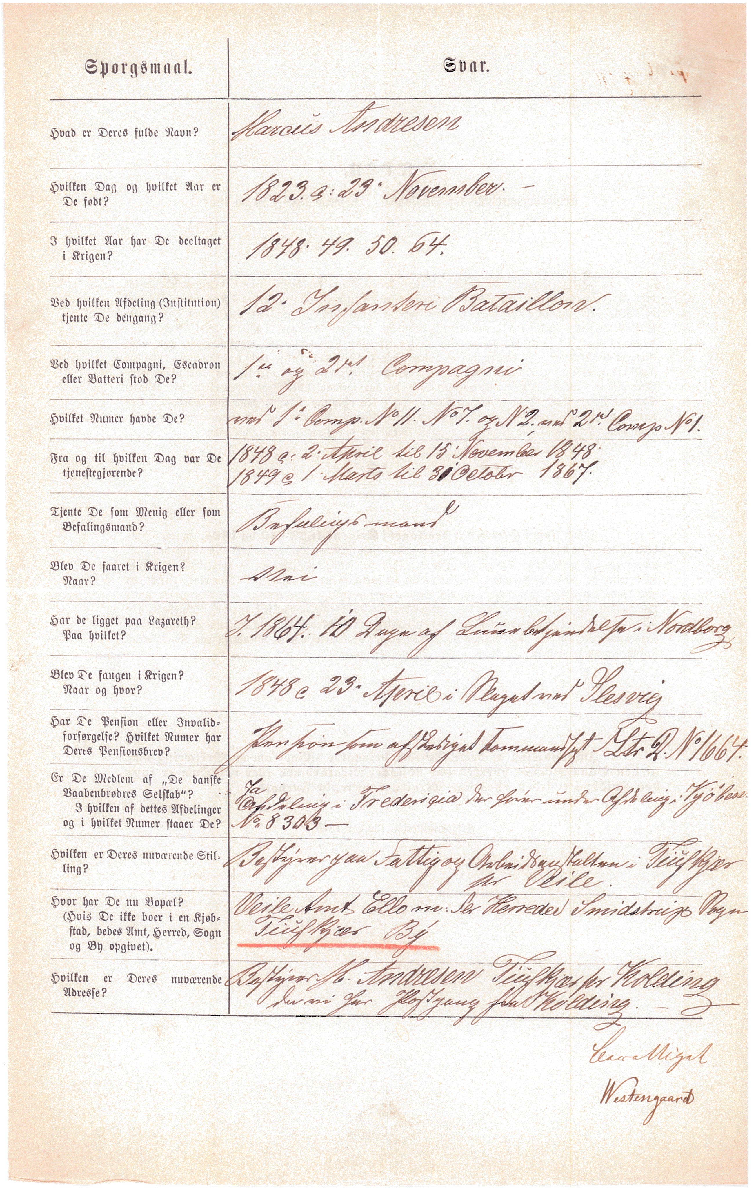 Rigsarkivet. Krigsministeriet. Ansøgninger om erindringsmedalje 1848-1850 og 1864 1848-1943